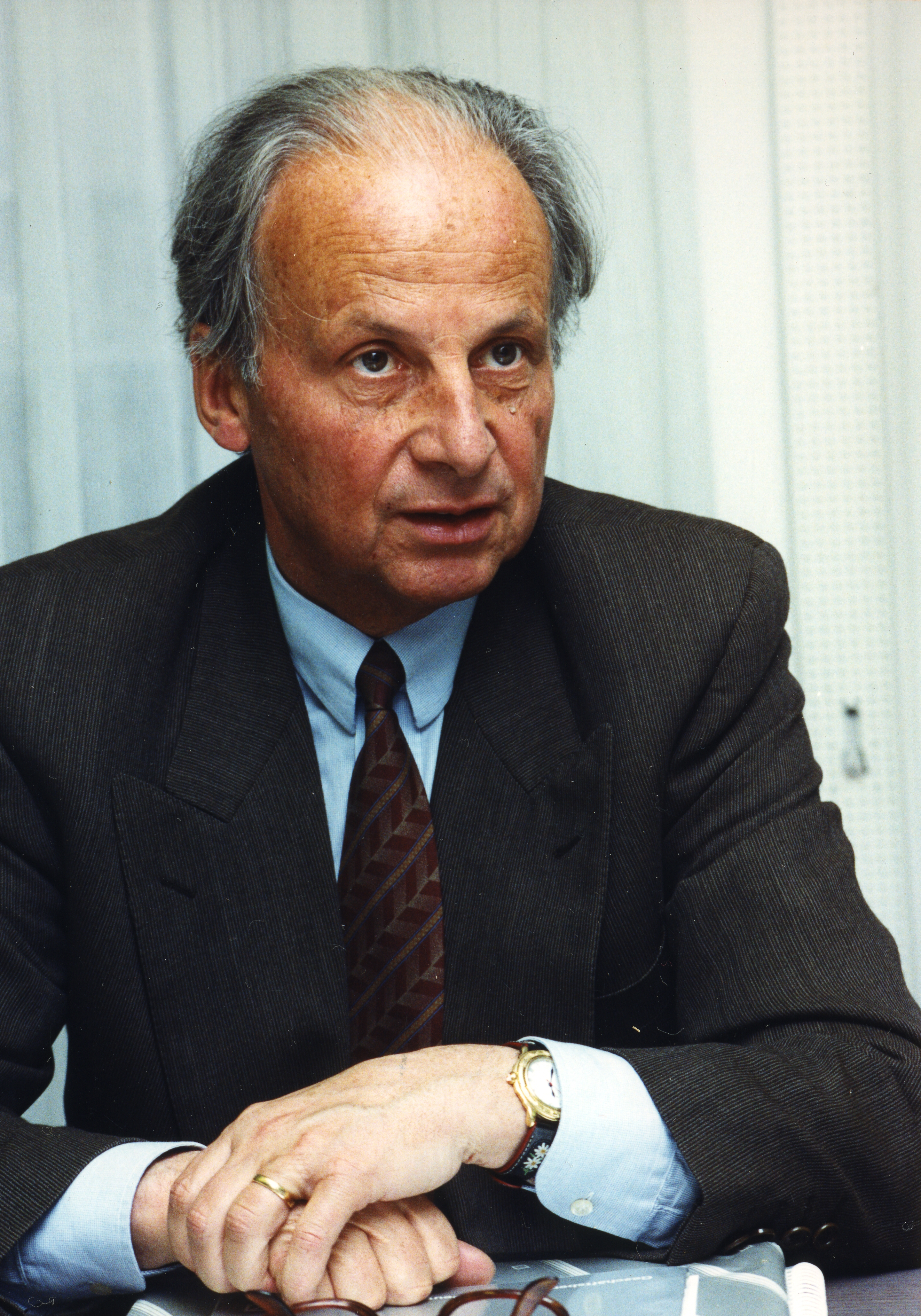 Porträt von Jost Prüm